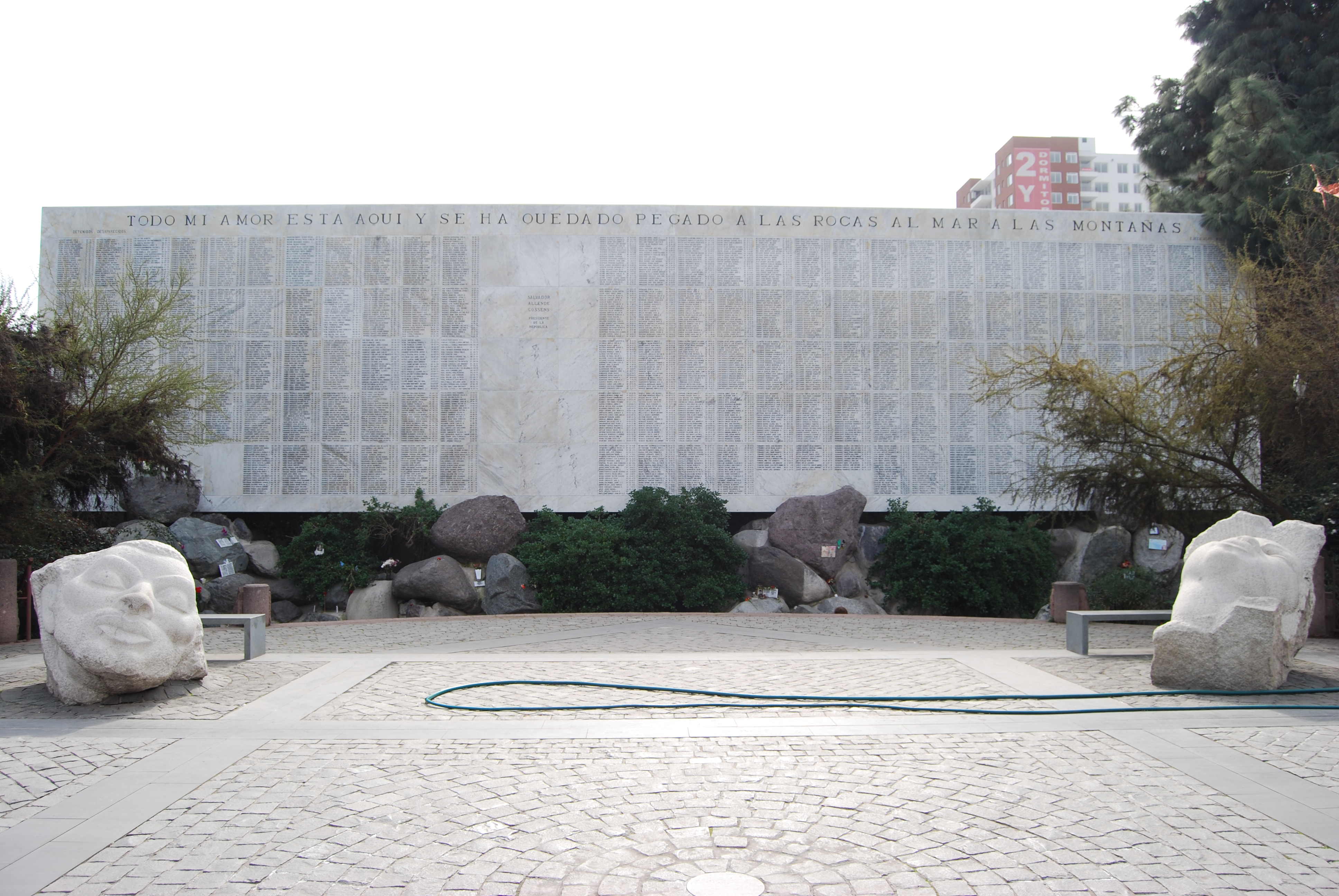 Memorial a los Detenidos Desaparecidos del Régimen Militar. Cementerio General, Santiago de Chile.